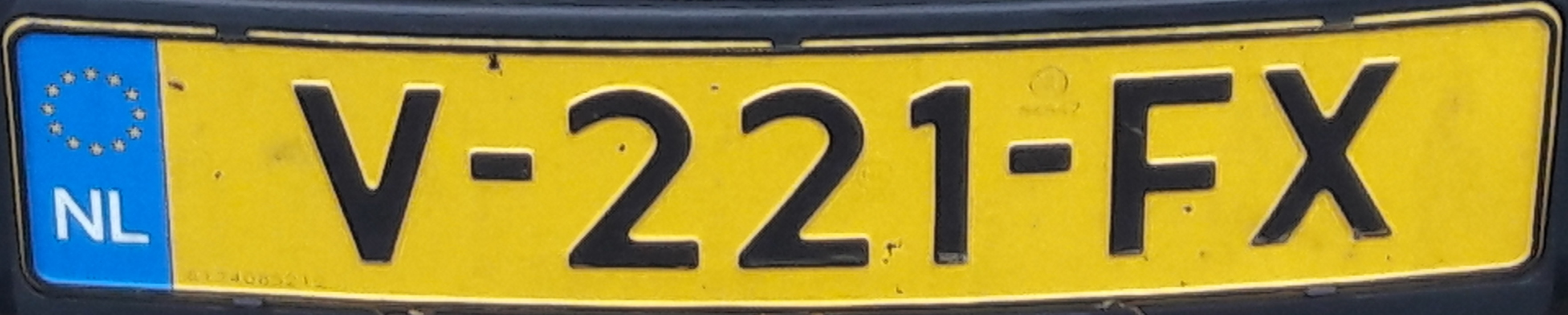 Side code 10